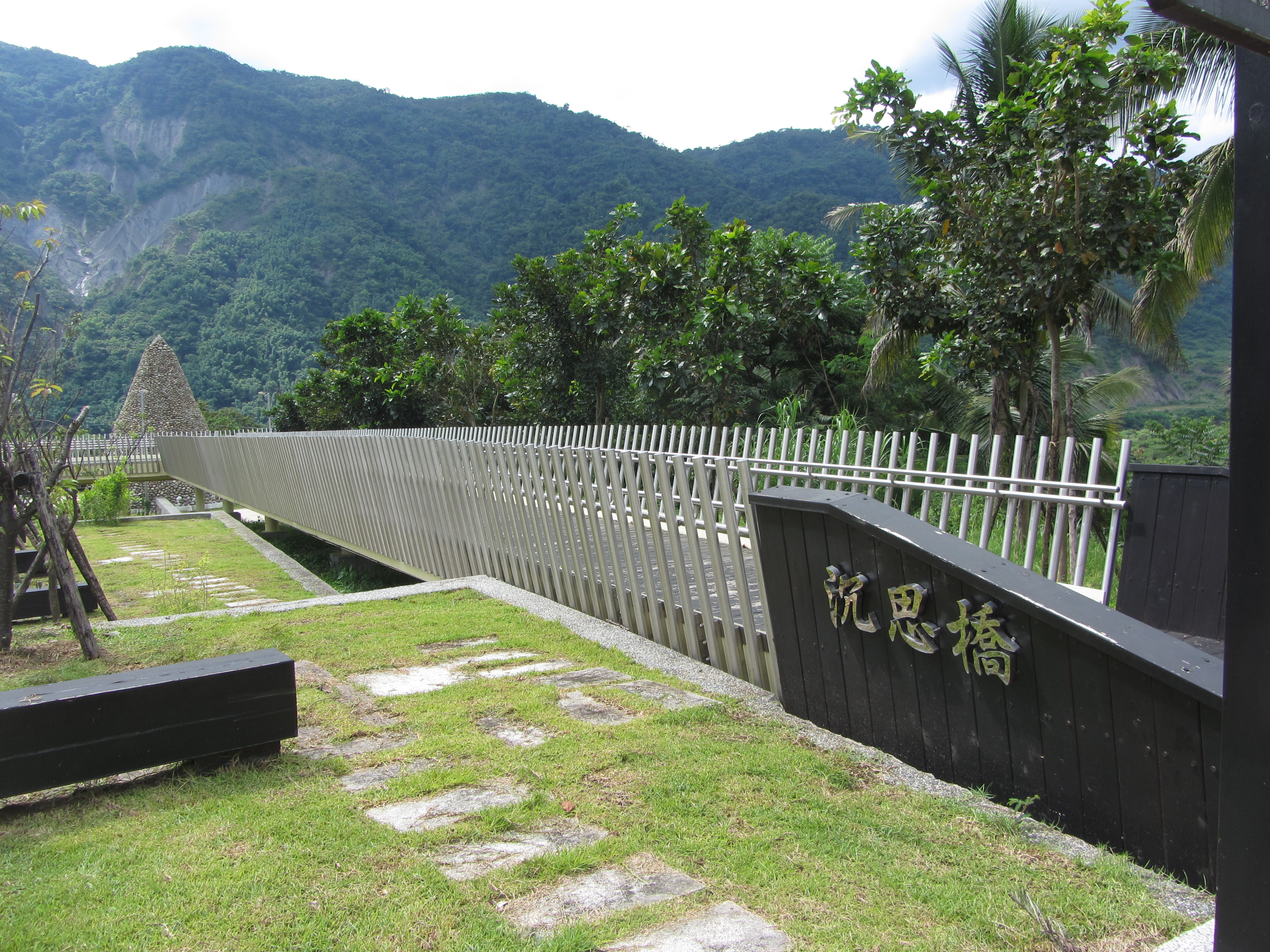 小林村紀念公園內的沉思橋和遠處位於追思廣場的紀念碑